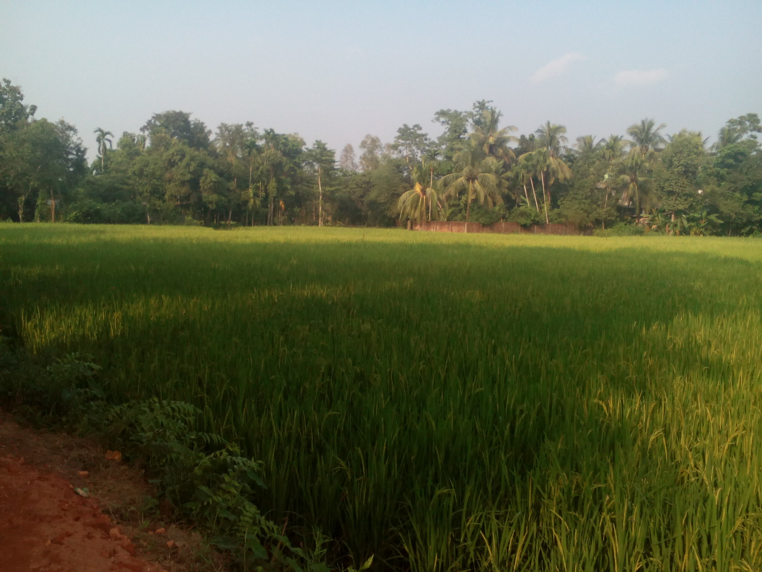 আধুনগর ধানক্ষেত ২